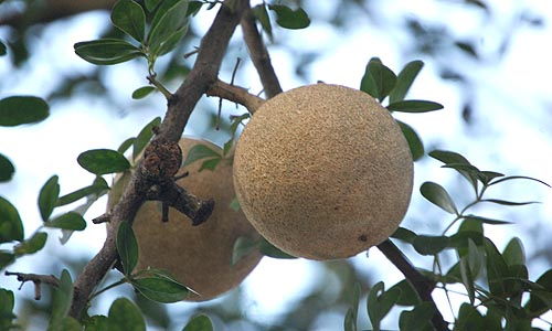 buah kawis